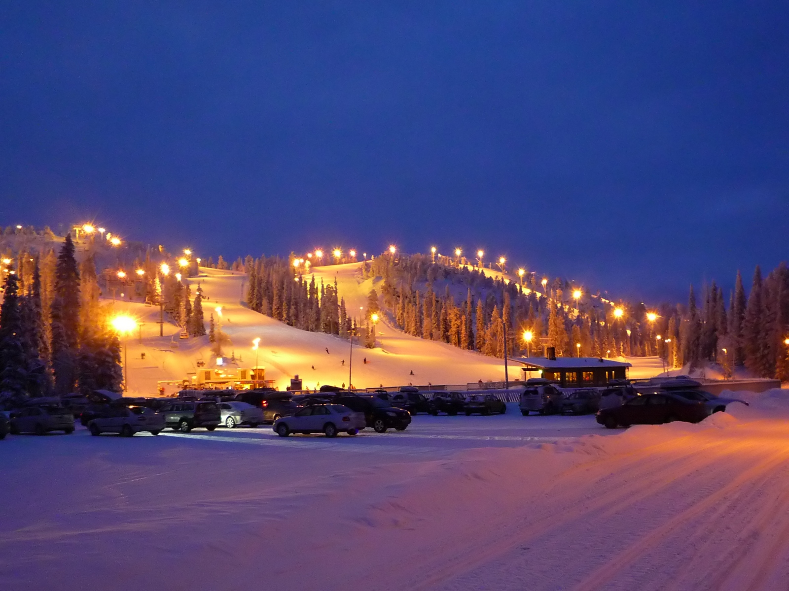 Part of the Ruka ski slopes all lit up. Ruka, Finland